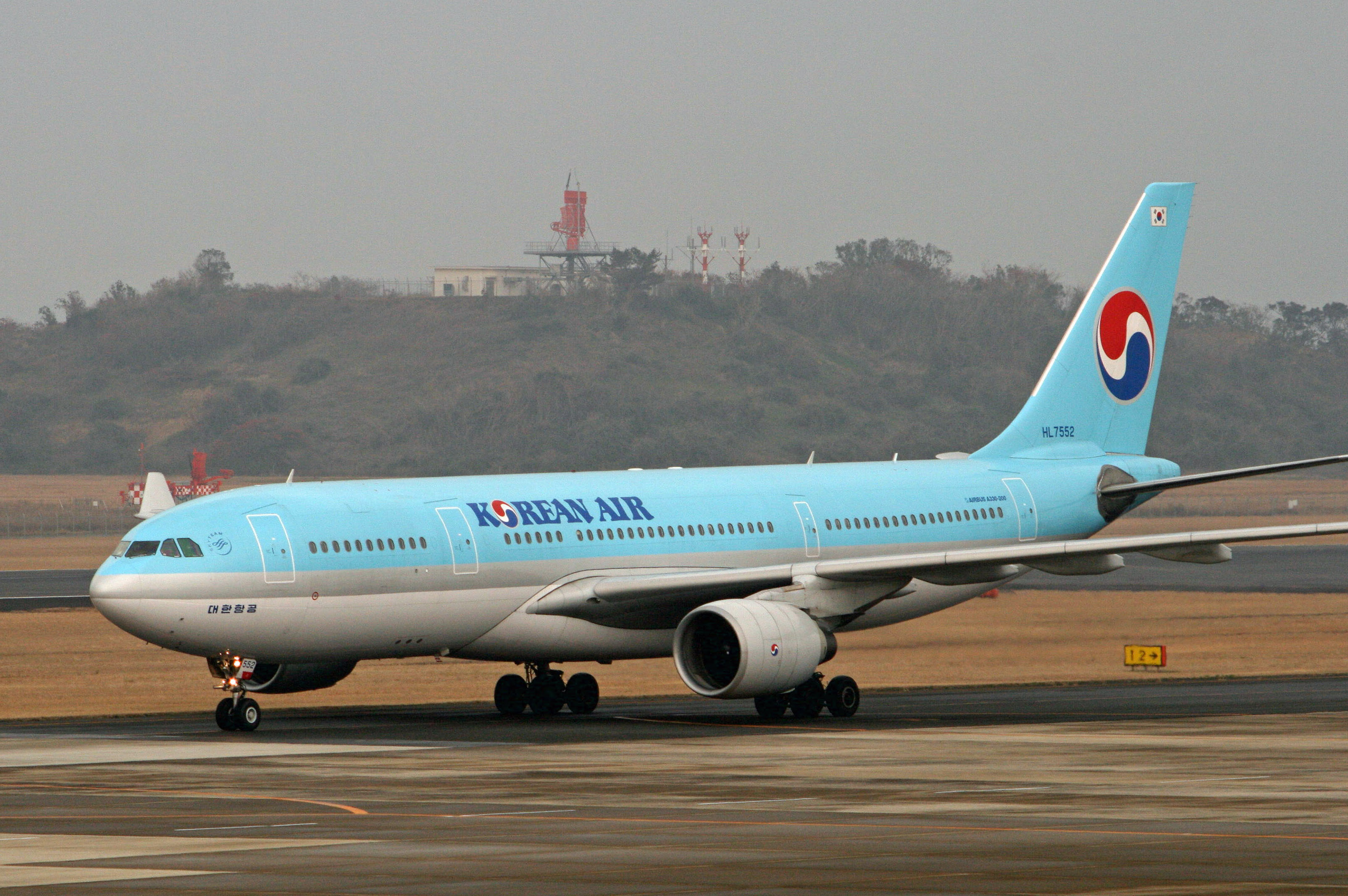 Korean Air A330-200(HL7552, taken at Nagasaki Airport)